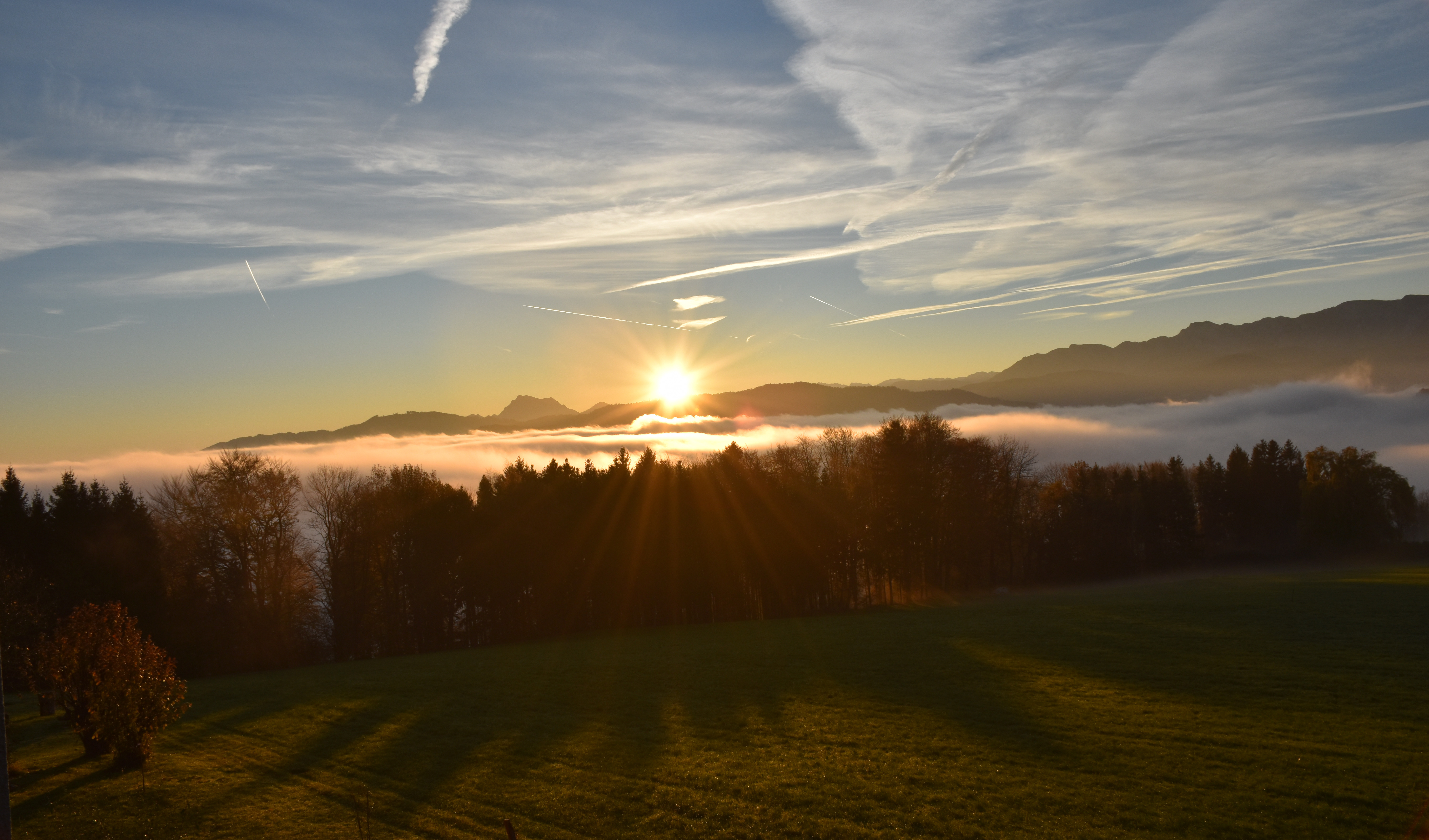 Sonnenaufgang in Berg im Attergau mit Blick auf den Attersee (Nebel)